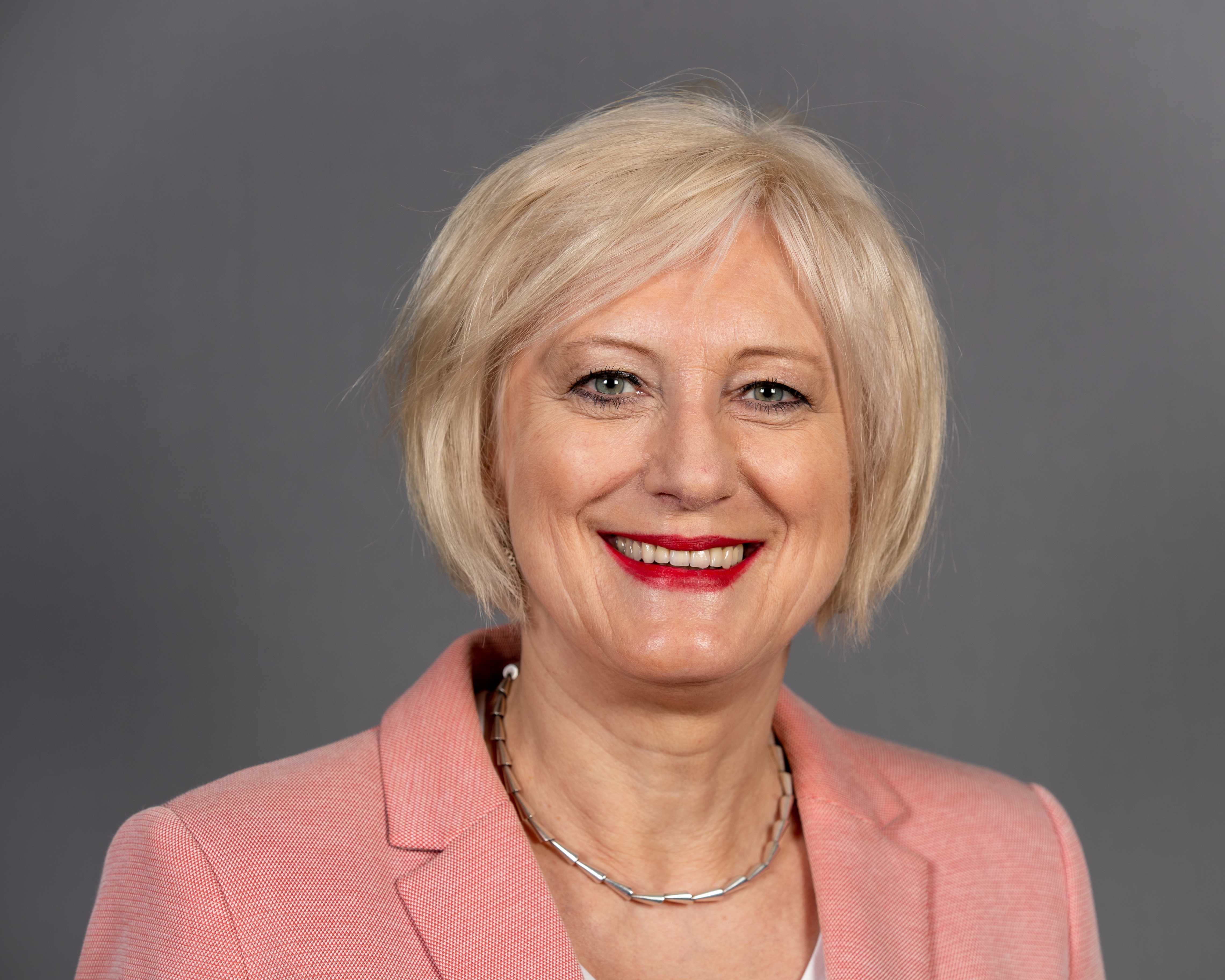 Dagmar Ziegler (SPD) beim Bundestagsprojekt 2020